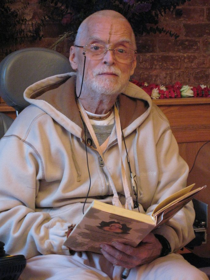 Kirtanananda Swami, taken at Radha-Muralidhara Temple, New York City (March 4, 2008)